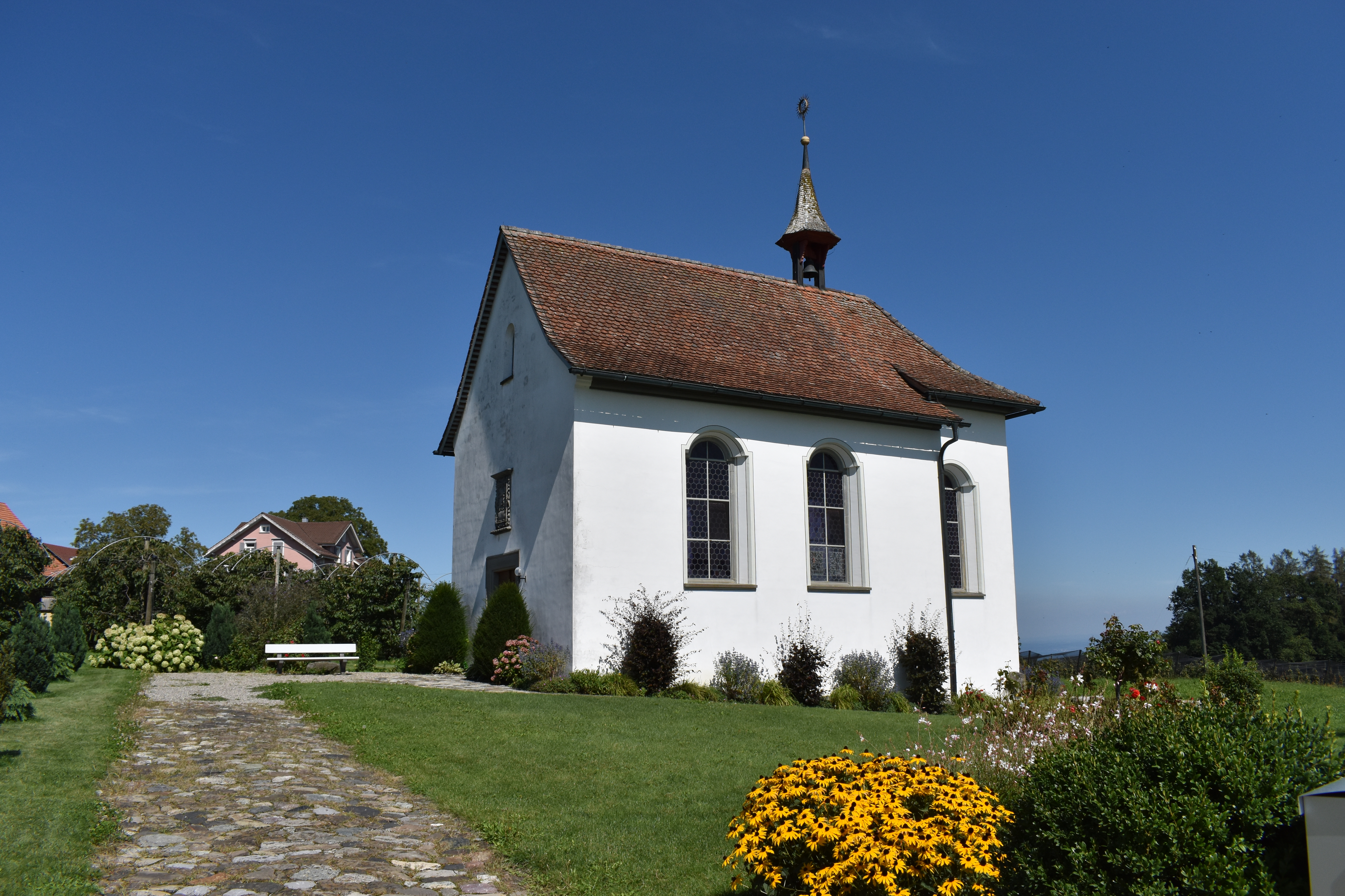 Marienkapelle Ruggisberg (Häggenschwil). Aussenansicht 3